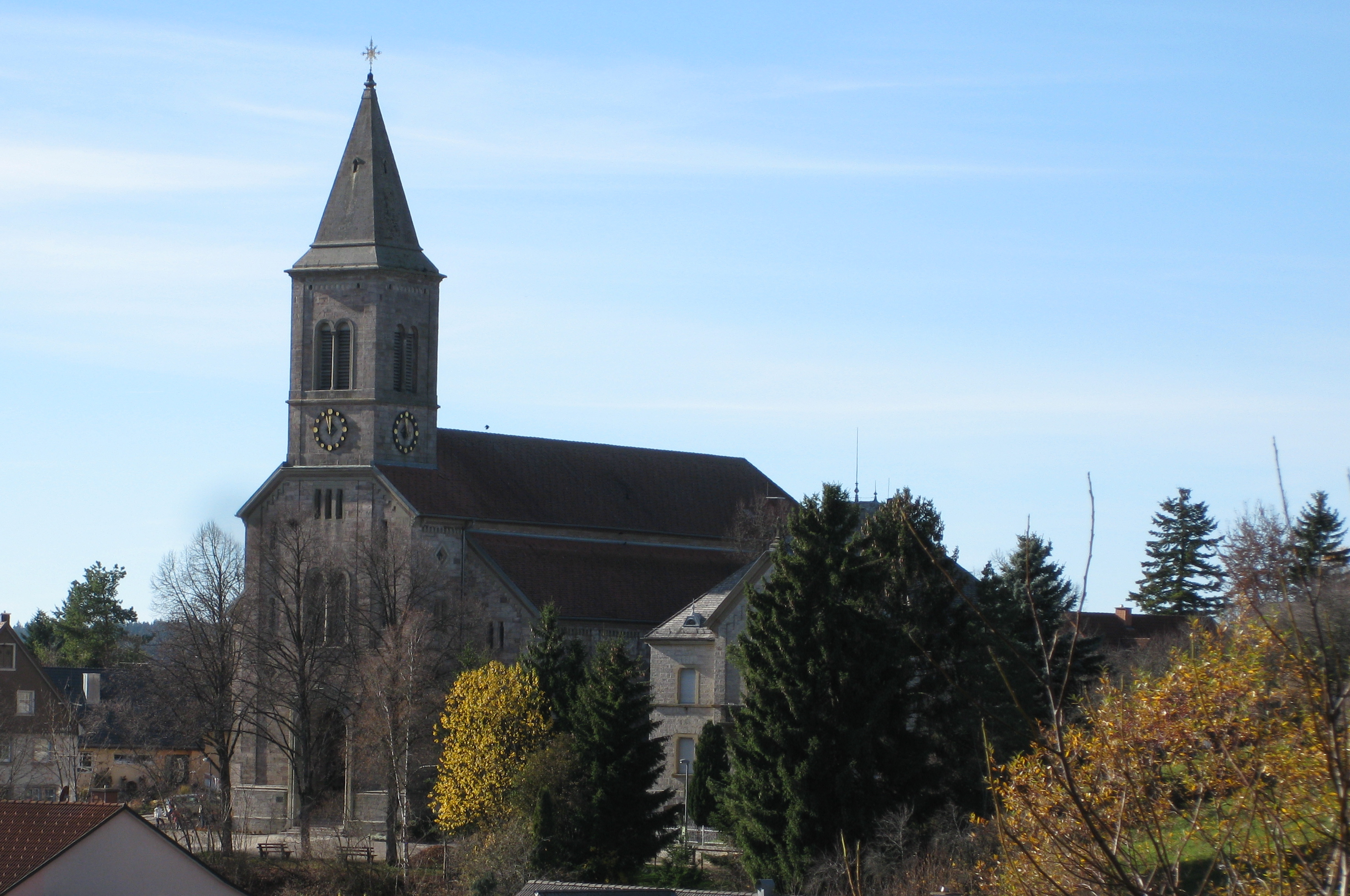 St. Peter und Paul vom Philopsophenweg aus gesehen